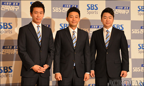 SBS스포츠 2015 프로야구 KBO리그 기자간담회